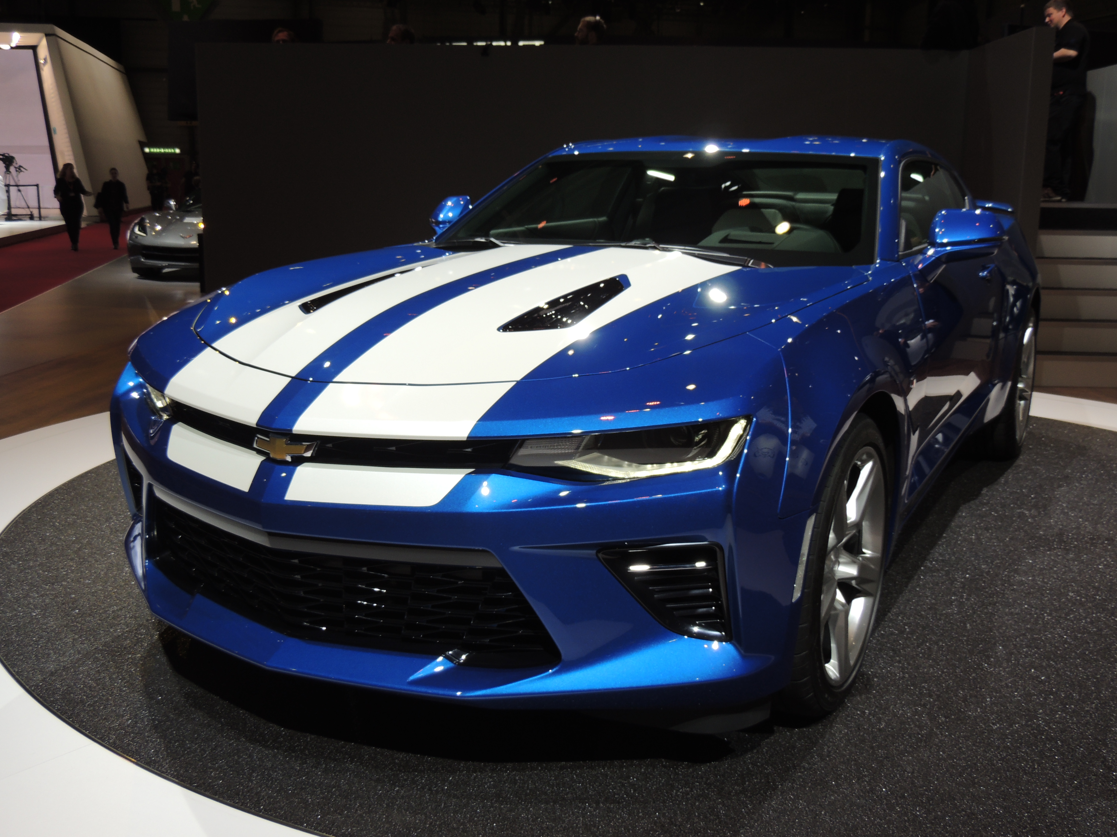 Chevrolet salon auto genève 2016